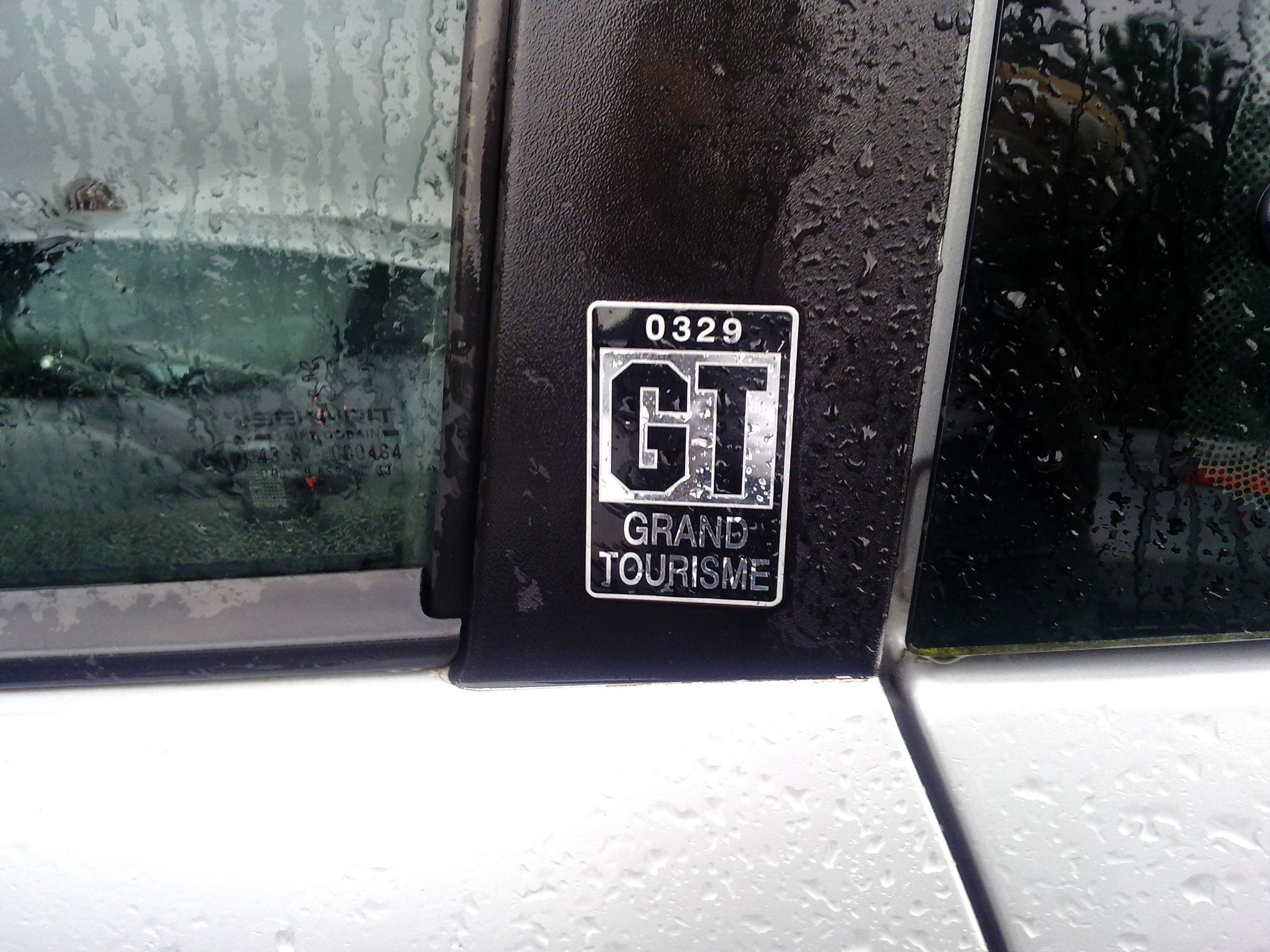 Plaque de Peugeot 206 GT numérotée